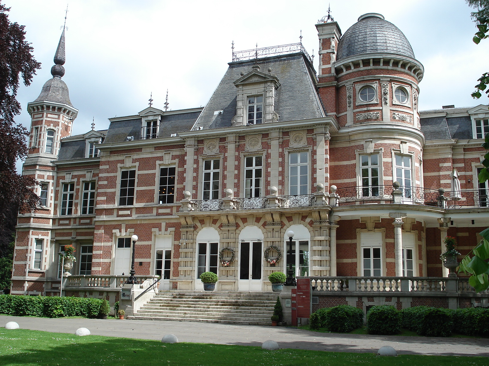 Brasschaat, comm. de la prov. d'Anvers, et lointaine banlieue nord de la ville d'Anvers (Belgique). Château néo-classique (1855-1909).